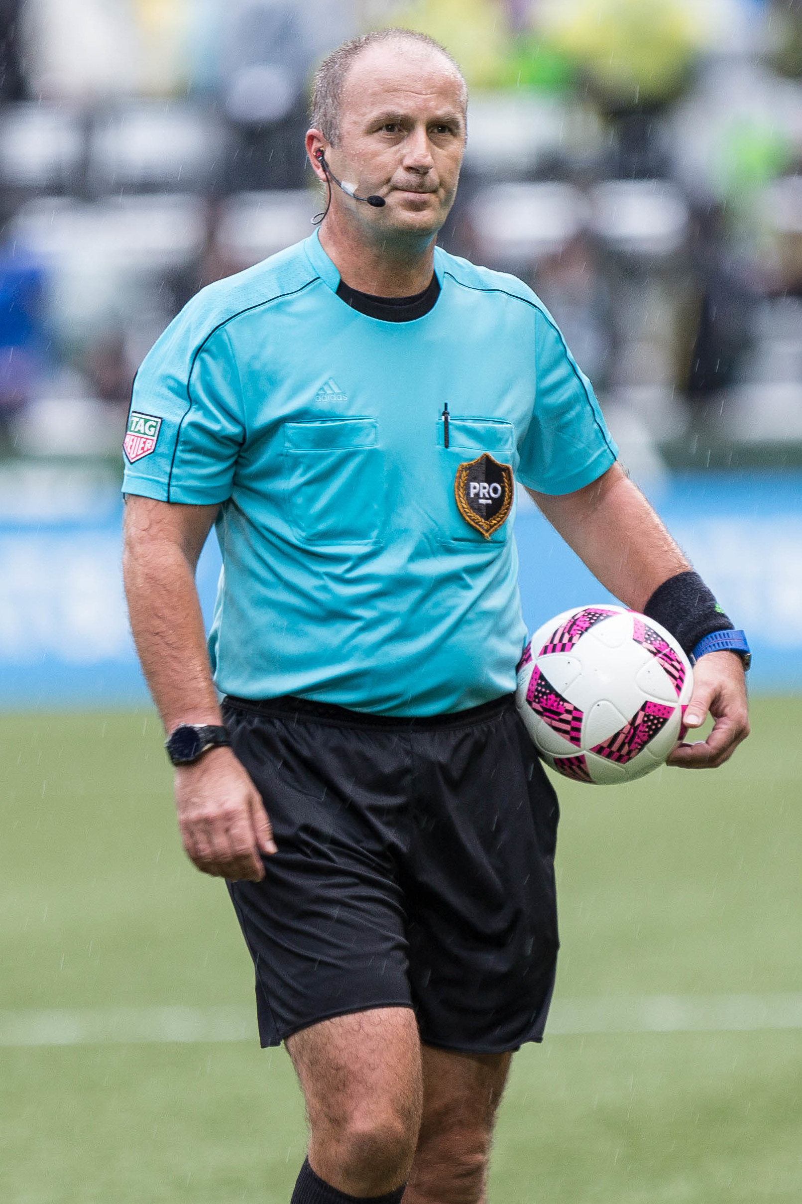 N42A0601.jpg